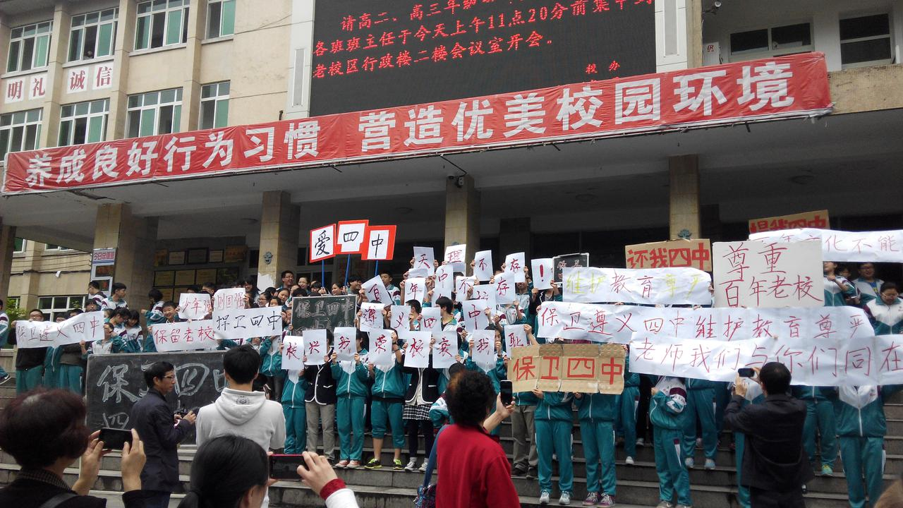 课间时间，学生到教学楼前支持教师抗议活动